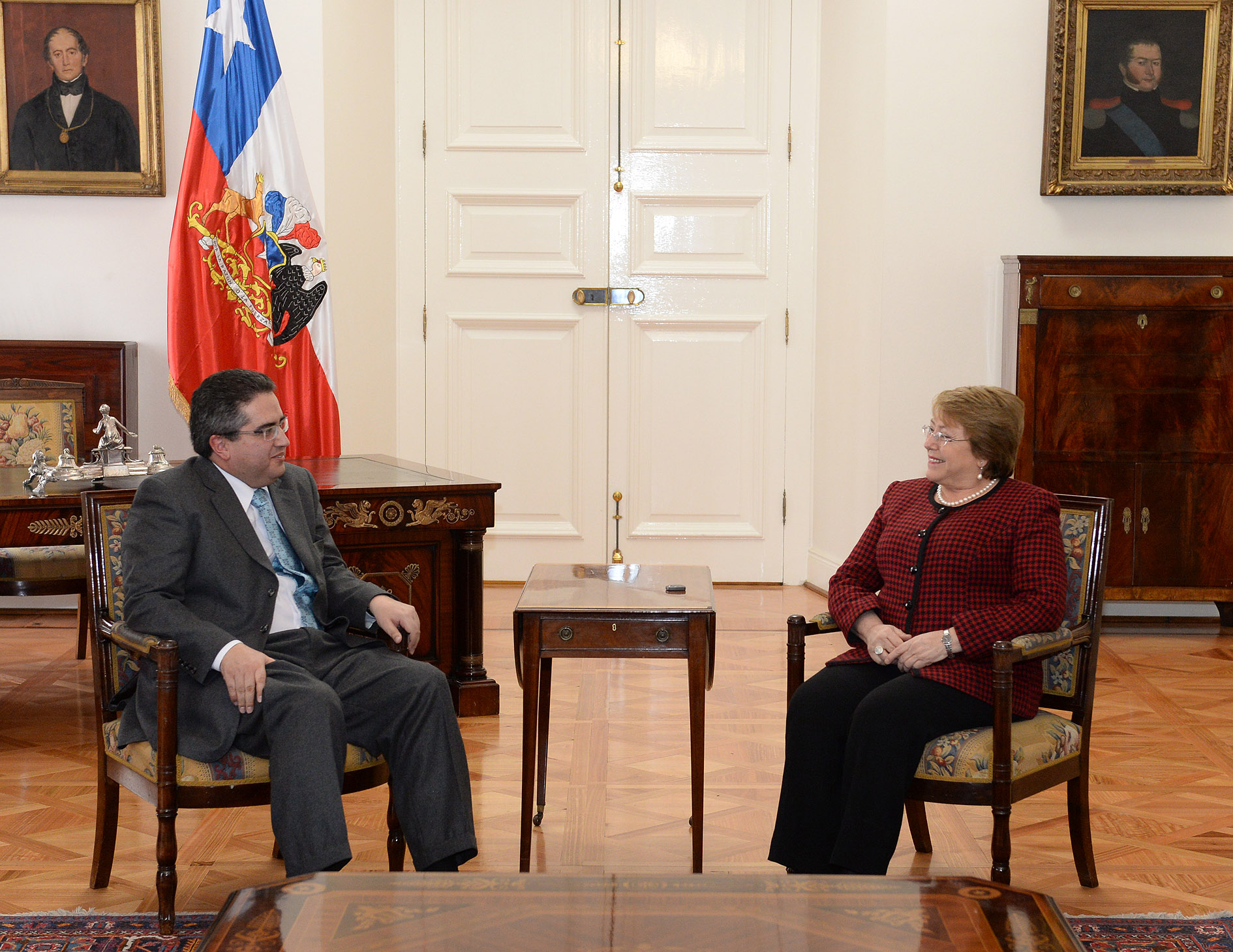 Presidenta de Michelle Bachelet, recibió el saludo protocolar del Presidente del Tribunal Constitucional.